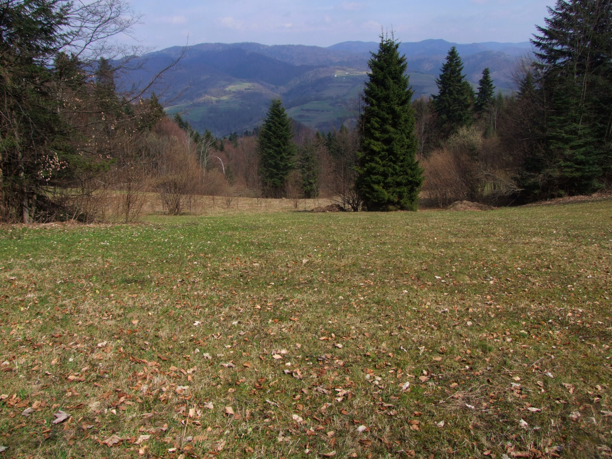 Polana Kurnikówka w Pieninach i widok na Beskid Sądecki (Pasmo Radziejowej)